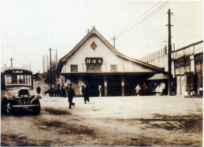 大塚駅。1928年から1944年3月まで存在した巣鴨高等商業学校(千葉商科大学の前身)の最寄り駅だった。